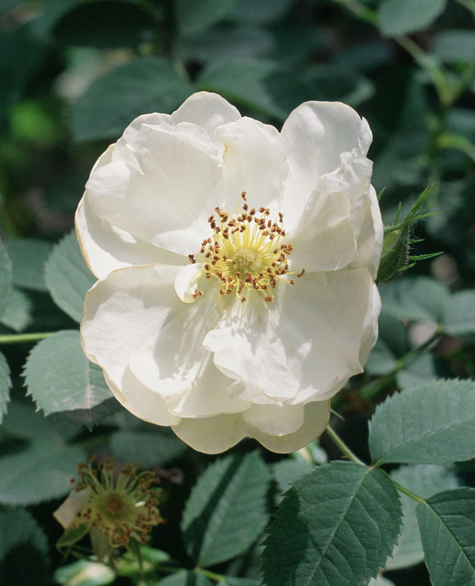 Rosa 'Semi-plena', gr. Alba, sect. Rosa. Real Jardín Botánico de Madrid.